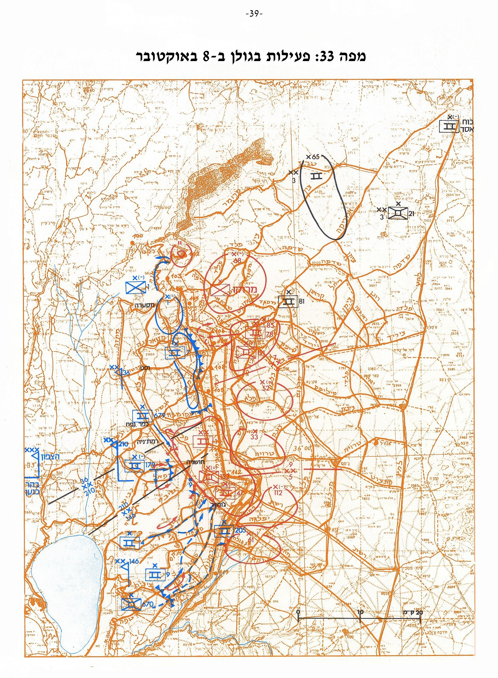 מפה 33 - פעילות בגולן ב-8 לאוקטובר - מלחמת יום הכיפורים